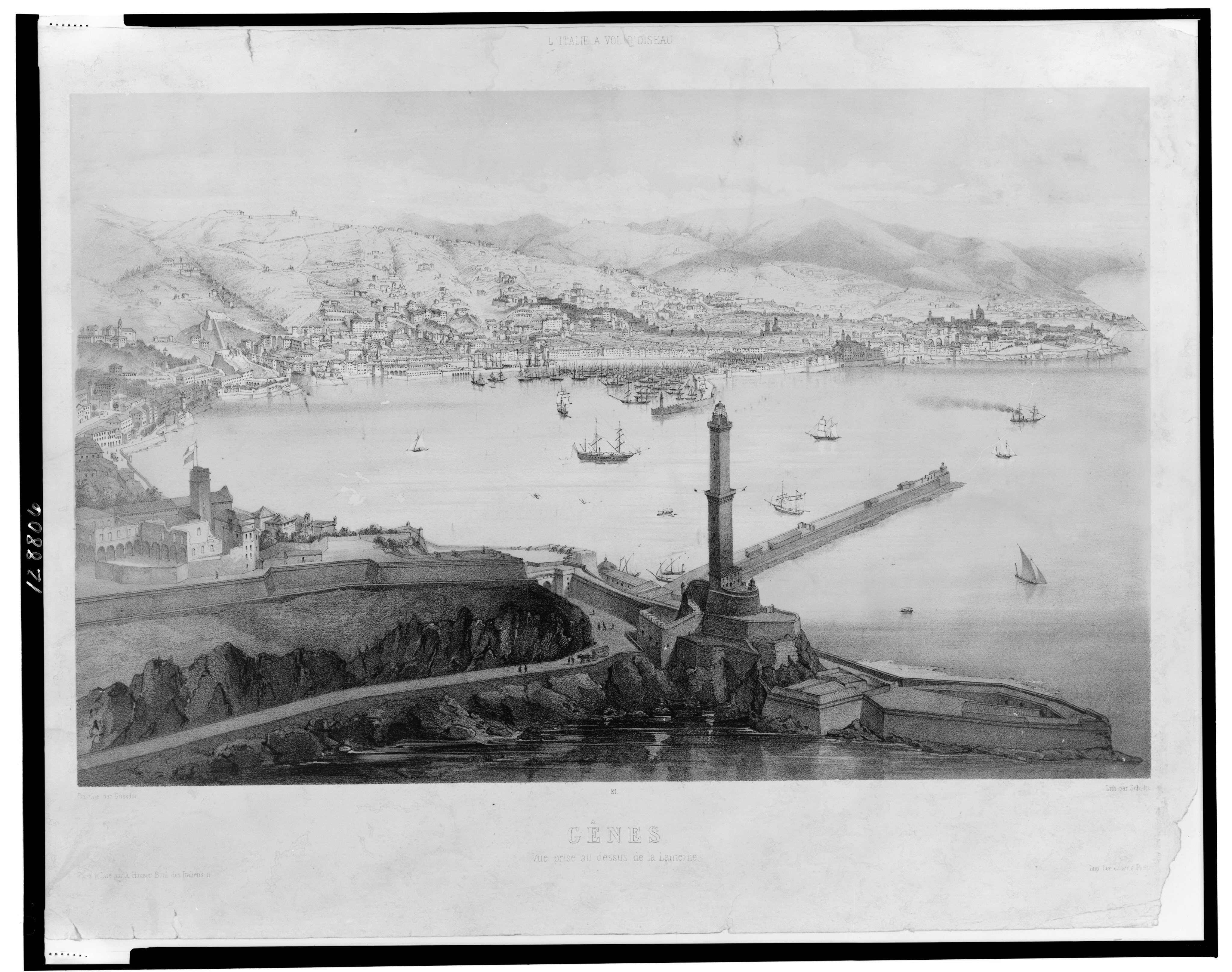 Il porto e la lanterna di Genova, in una litografia di , Alfred Guesdon (1808-1876) della metà del XIX secolo (185x). Original caption: "L'ITALIE A VOL D'OISEAU / Dessiné par Guesdon / Lith par Schultz / GÊNES / Vue prise au dessus de la lanterne"